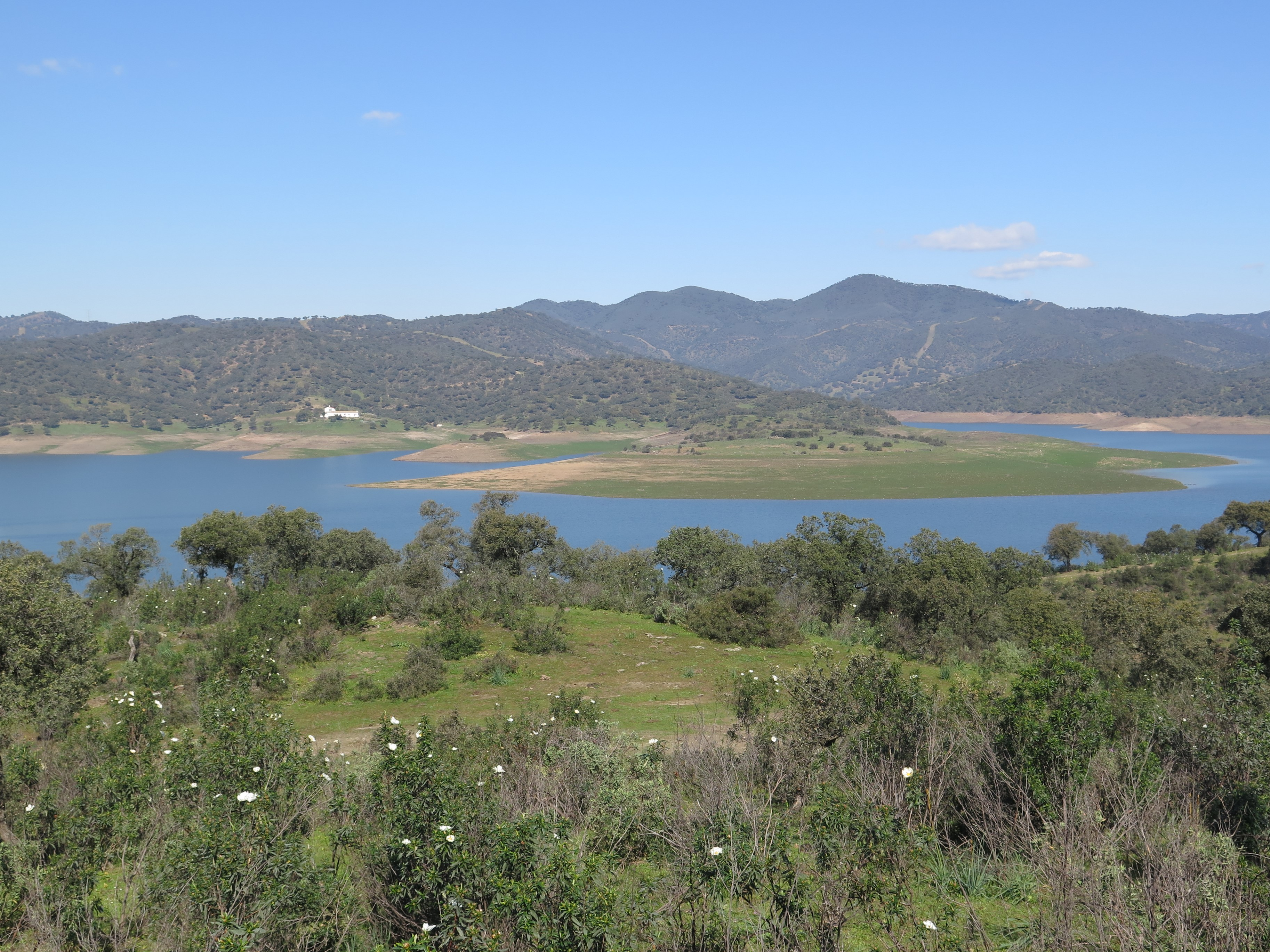 Vista del embalse del Yeguas.